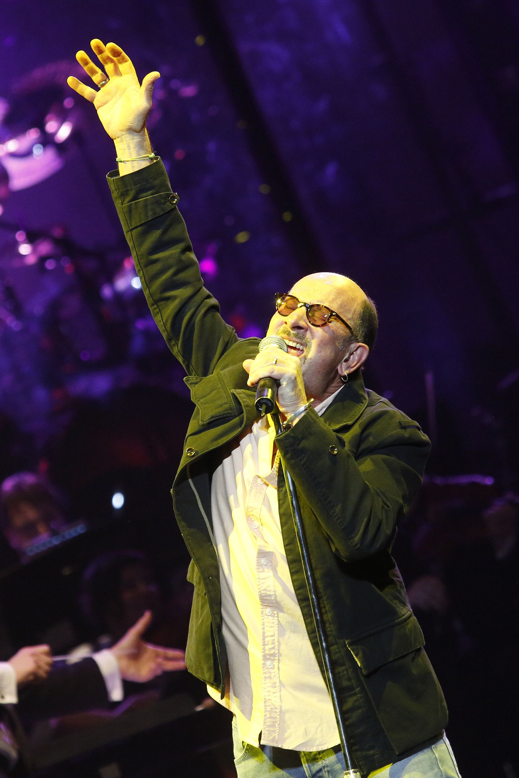 Chris Hamlet Thompson, ehemaliger Sänger der Manfred Manns Earth Band, steht bei Rock Meets Classic am 25.02.2013 in der Jahrhunderthalle Frankfurt auf der Bühne.